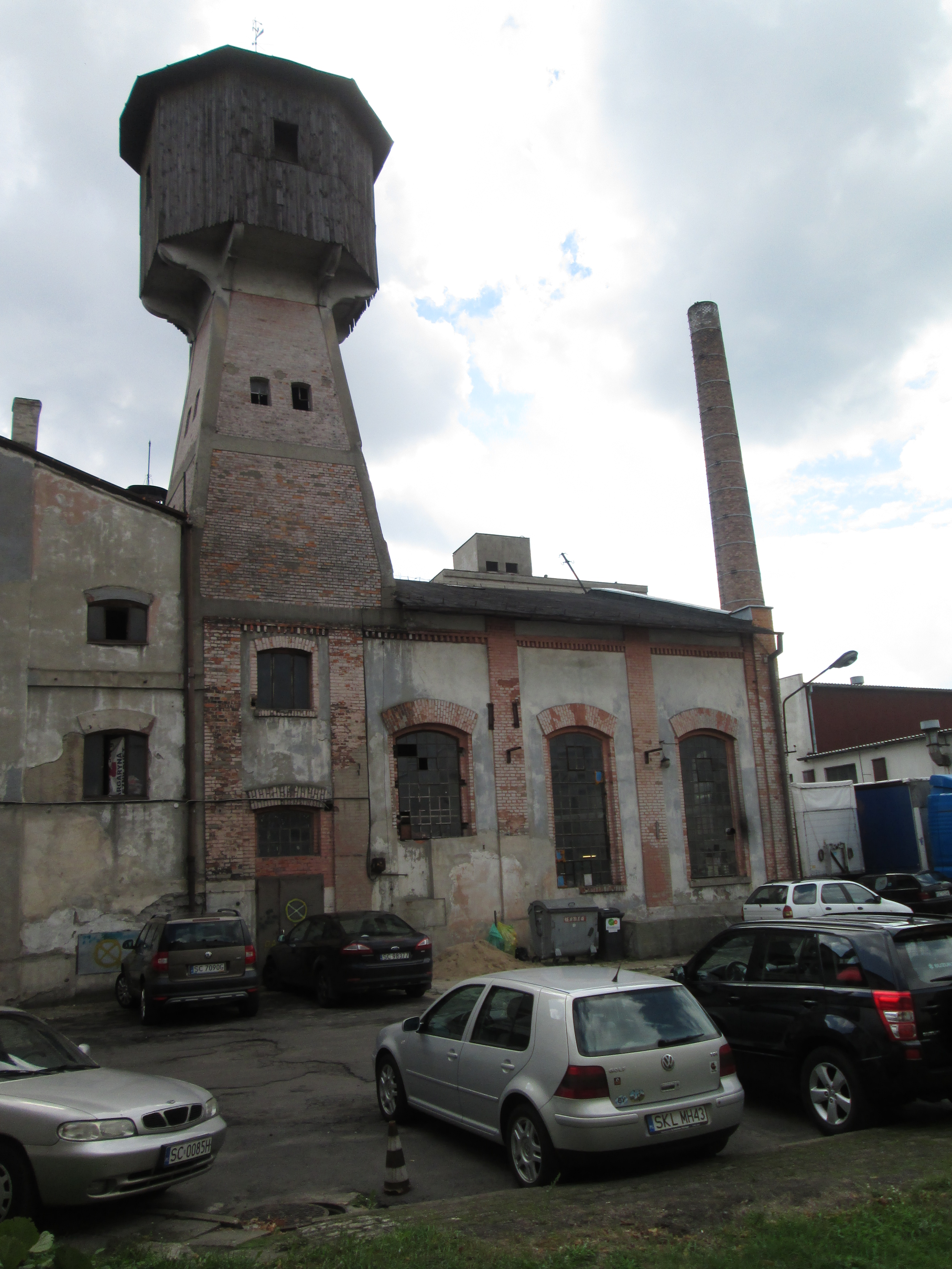 Częstochowa, zespół browaru